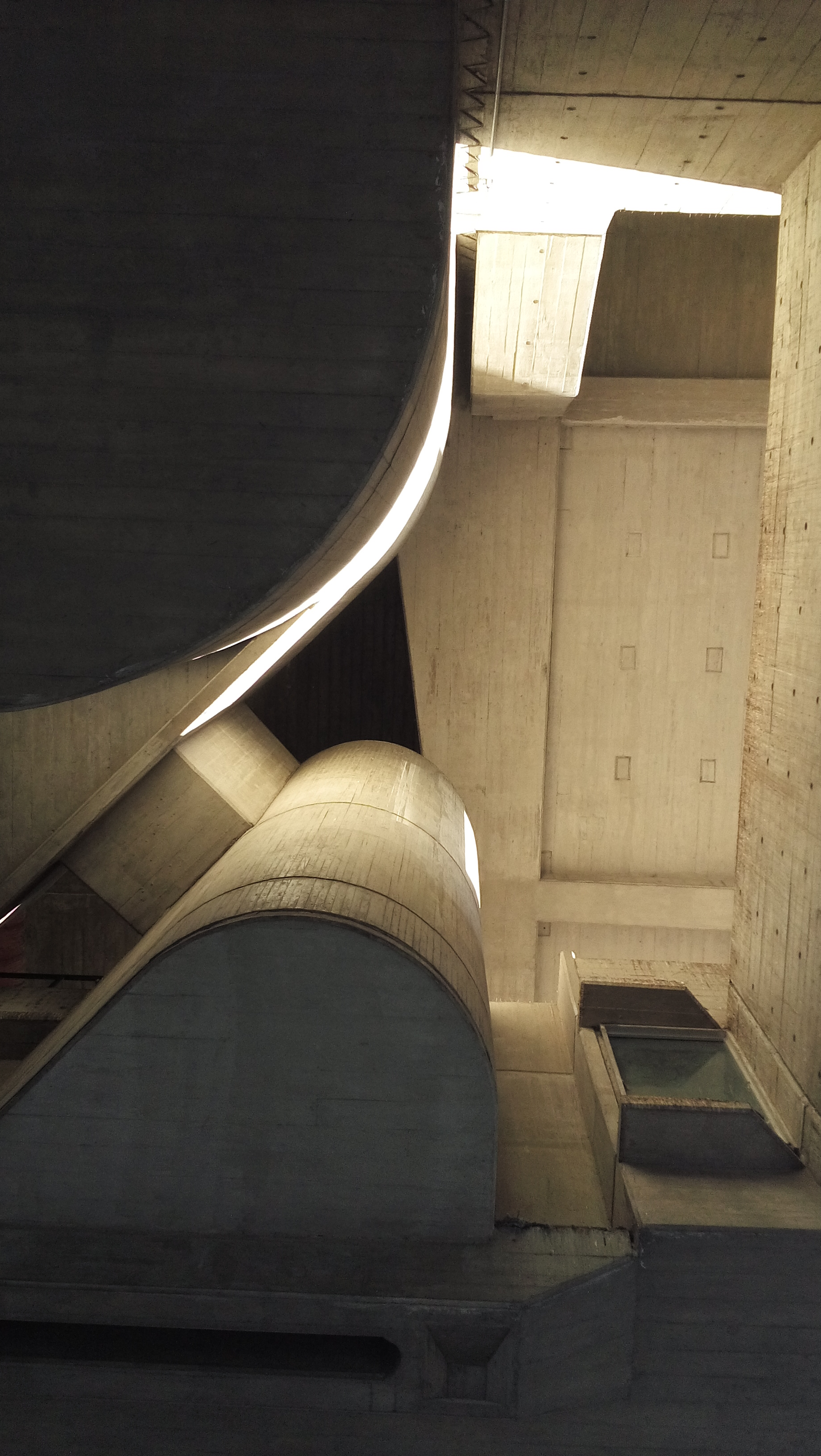 Clorindo Testa, Biblioteca Nacional (nadir)